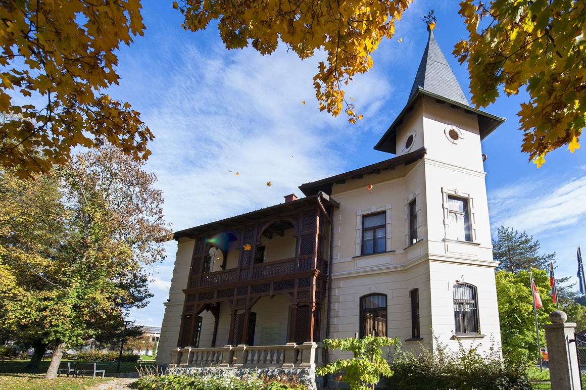 Vila Mayer